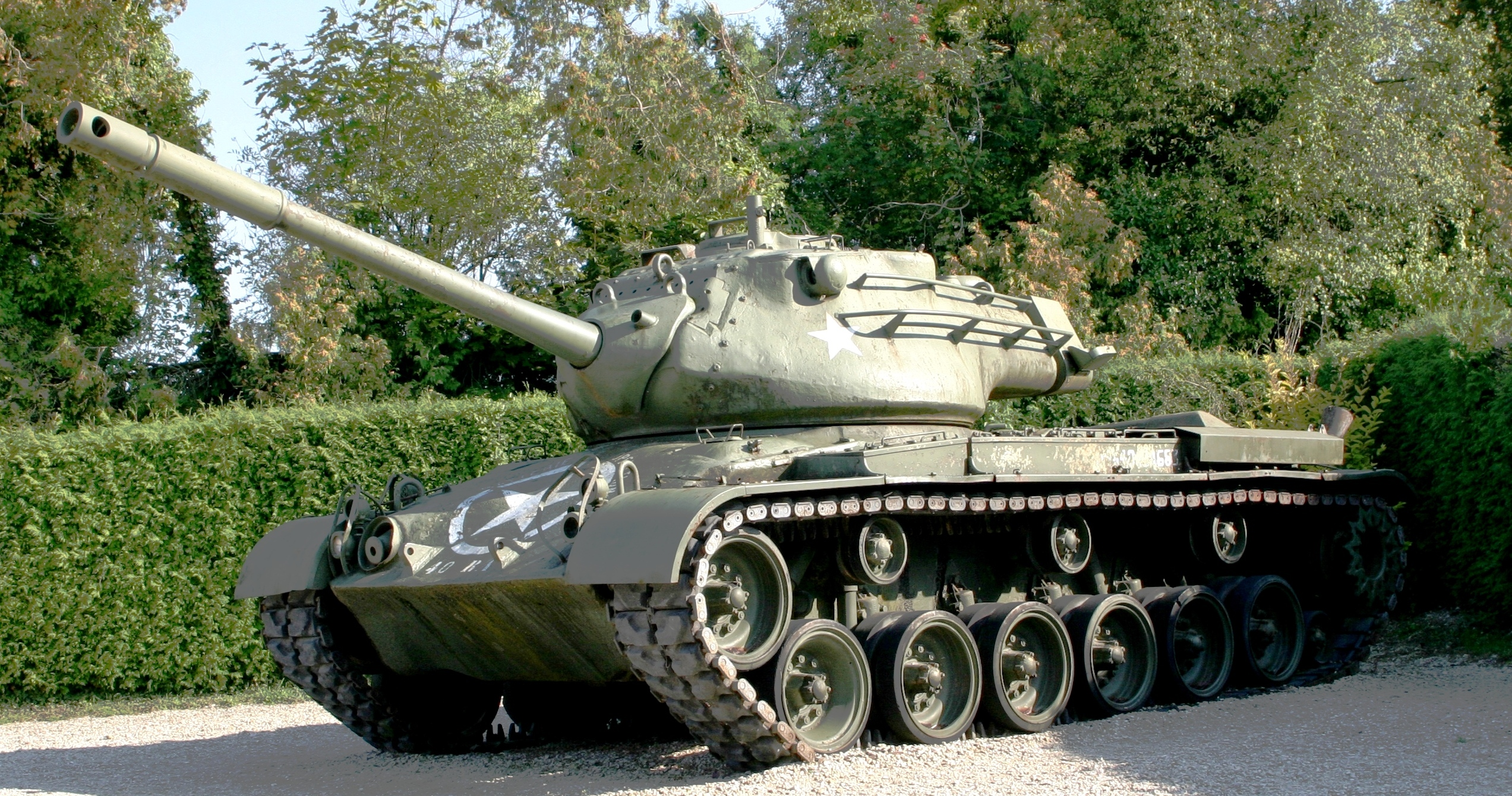 Patton-Tanks zu Valmy.